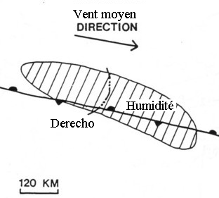 Position des systèmes météorologique lors du type de Derecho de saison chaude. Le Derecho se forme le long d'une zone frontale stationnaire parallèle à un axe de maximum d'humidité et dans l,axe des vents d'altitude.